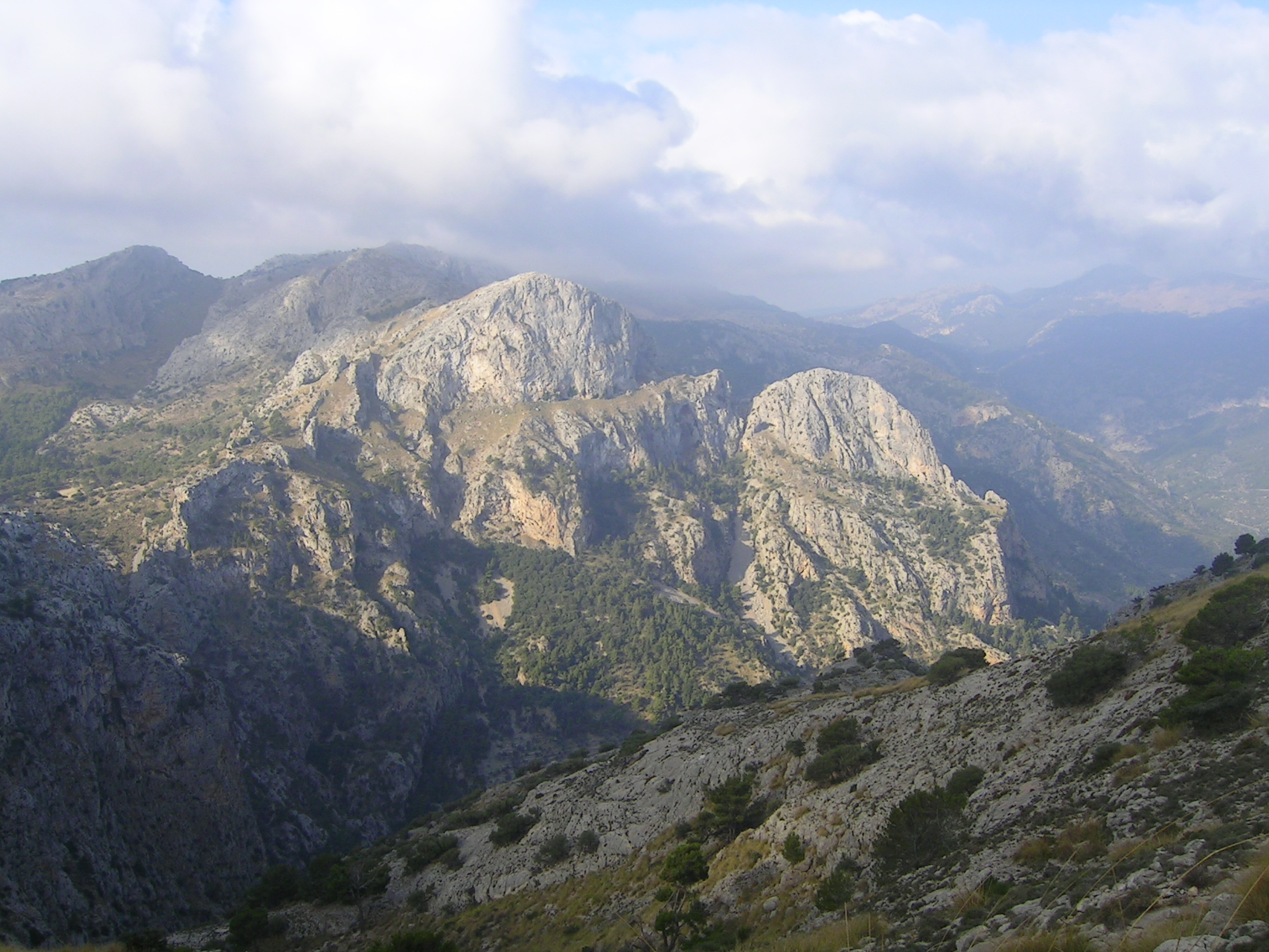 Barranc de Biniaraix des de la Coma de Son Torrella, Mallorca.